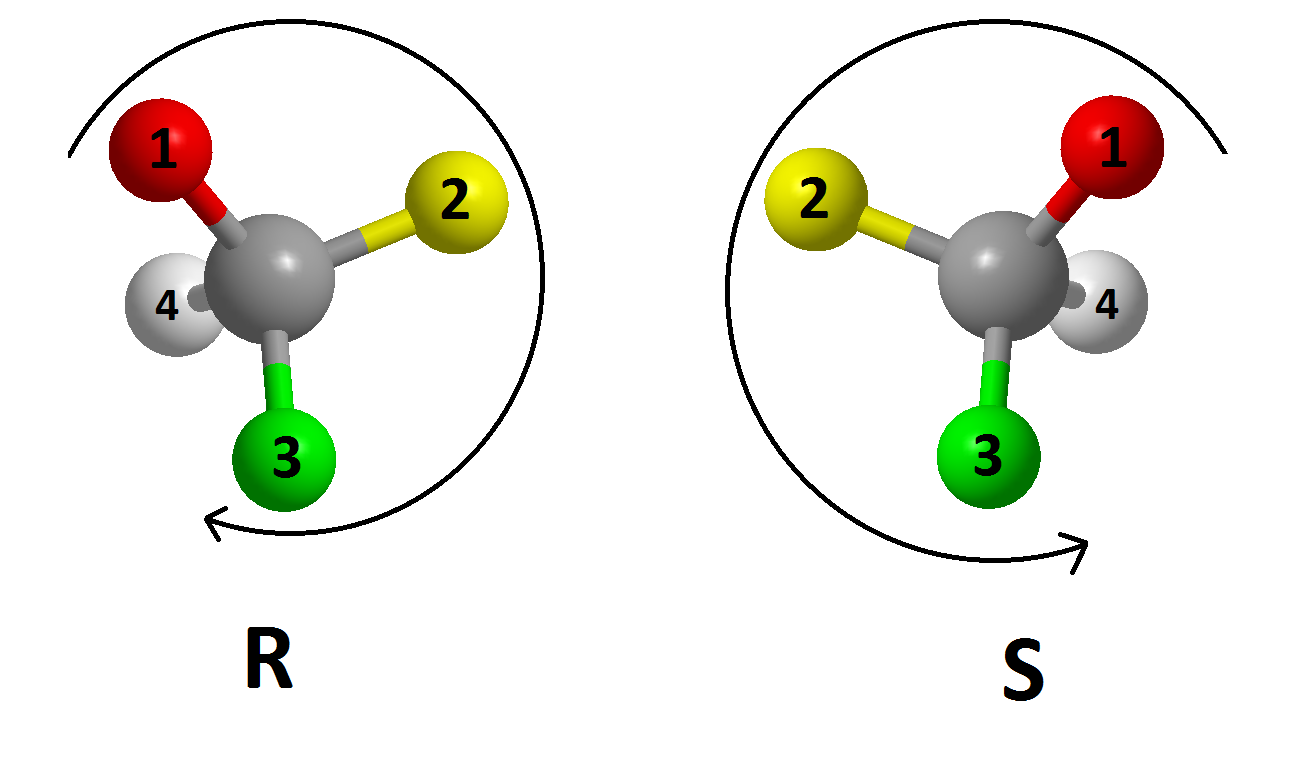 Assignació de les configuracions R i S en un centre quiral.